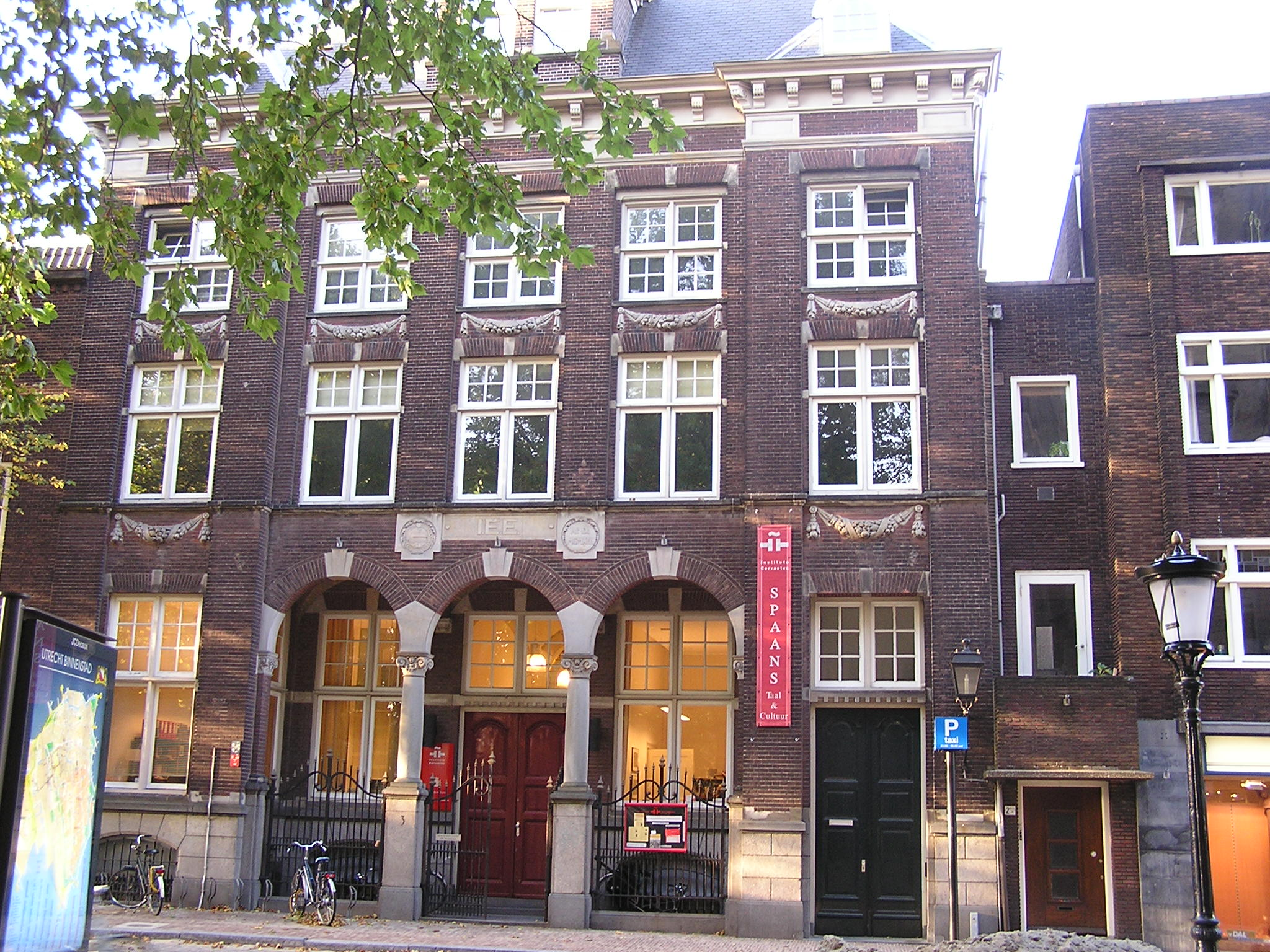 Instituto Cervantes (Spanish cultural centre), Utrecht